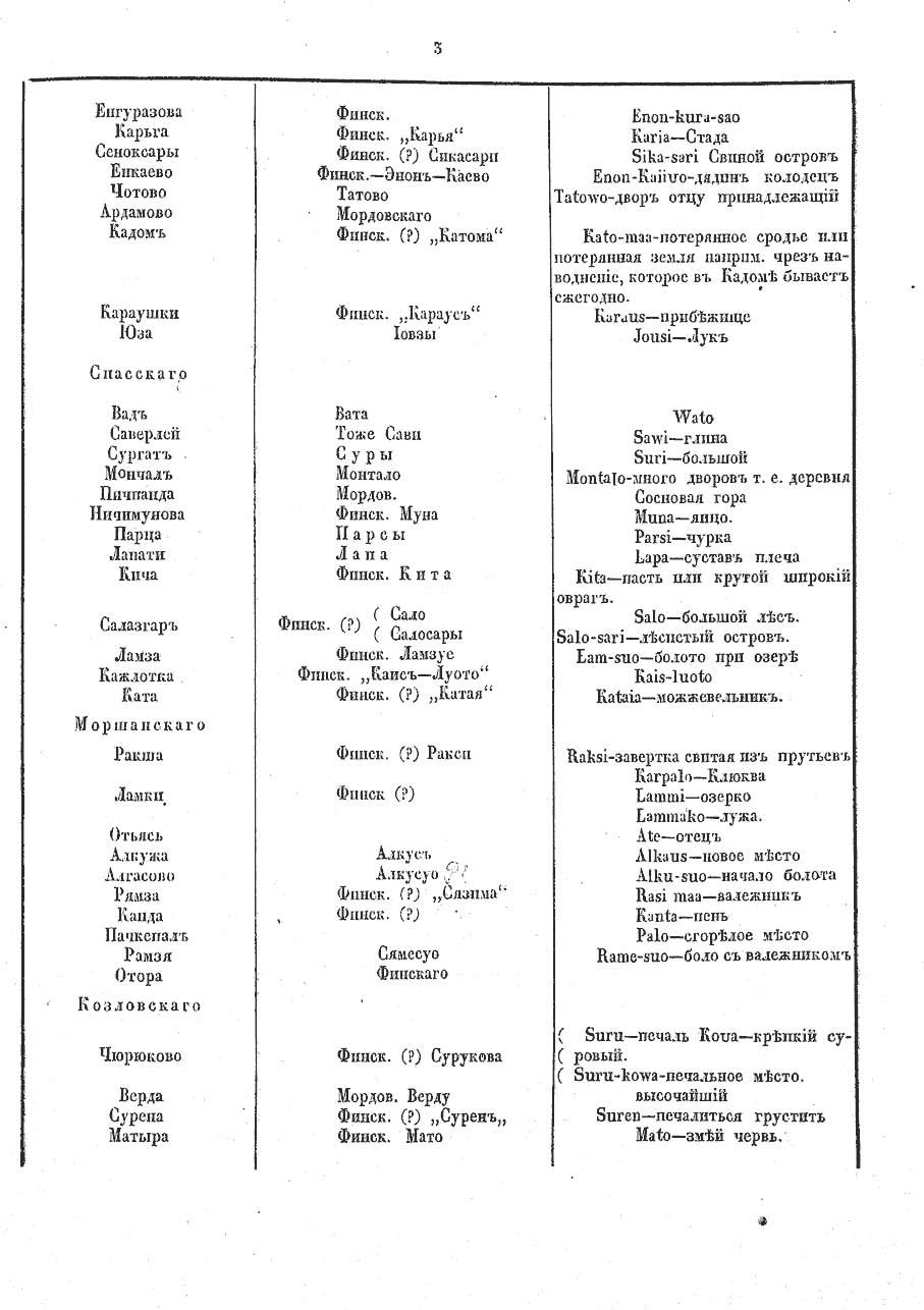 Версия сторонников угро-финского происхождения гидронима. Из "Памятной книжки для Тамбовской губернии", 1861 год.